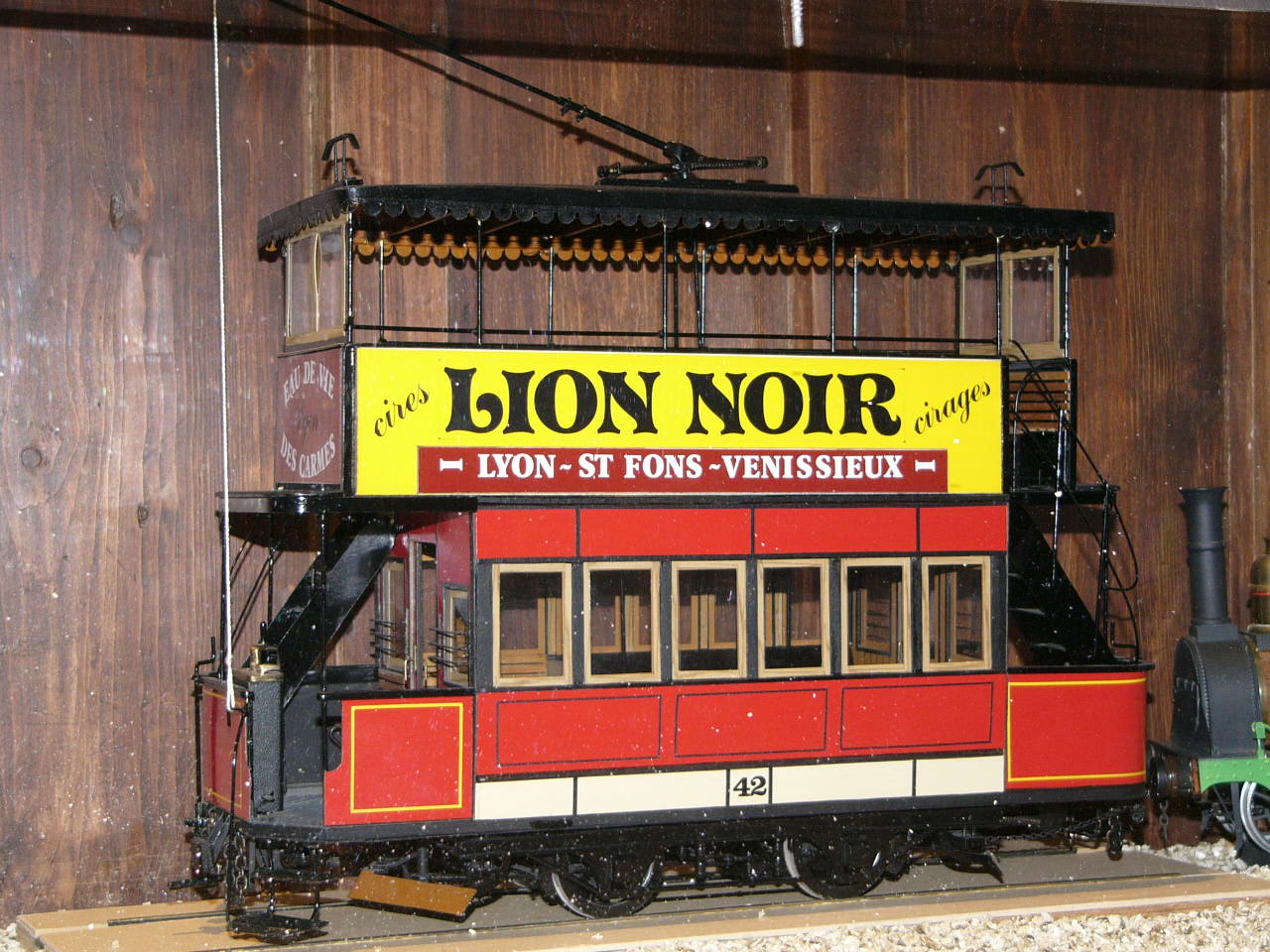 Maquette de tramway lyonnais à impériale Exposé au refuge de la Mer de Glace (Mont Blanc)